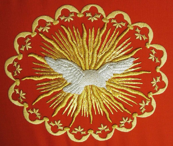 Broderie d'or avec cannetille et laminette en passé plat